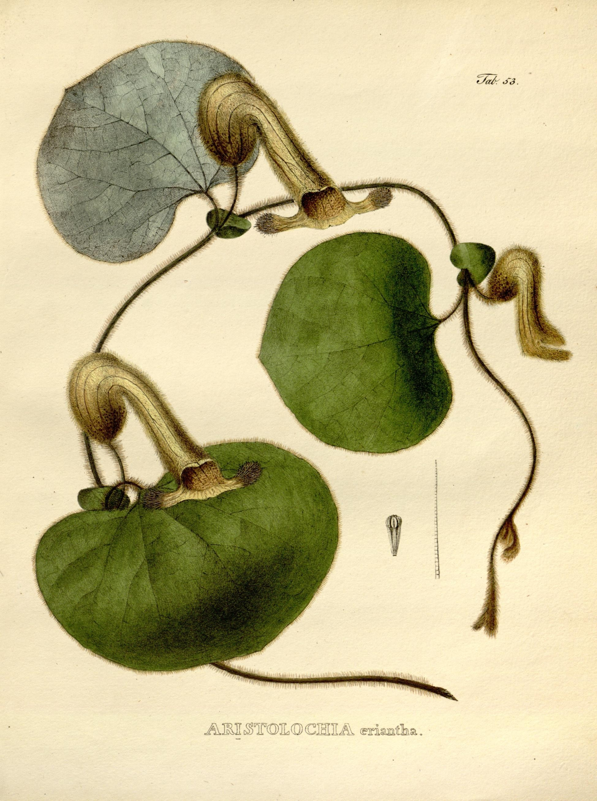 Aristolochia eriantha Nova genera et species plantarum. Monachii [Munich] :Impensis Auctoris,1824-1829 [i.e. 1824-32]..